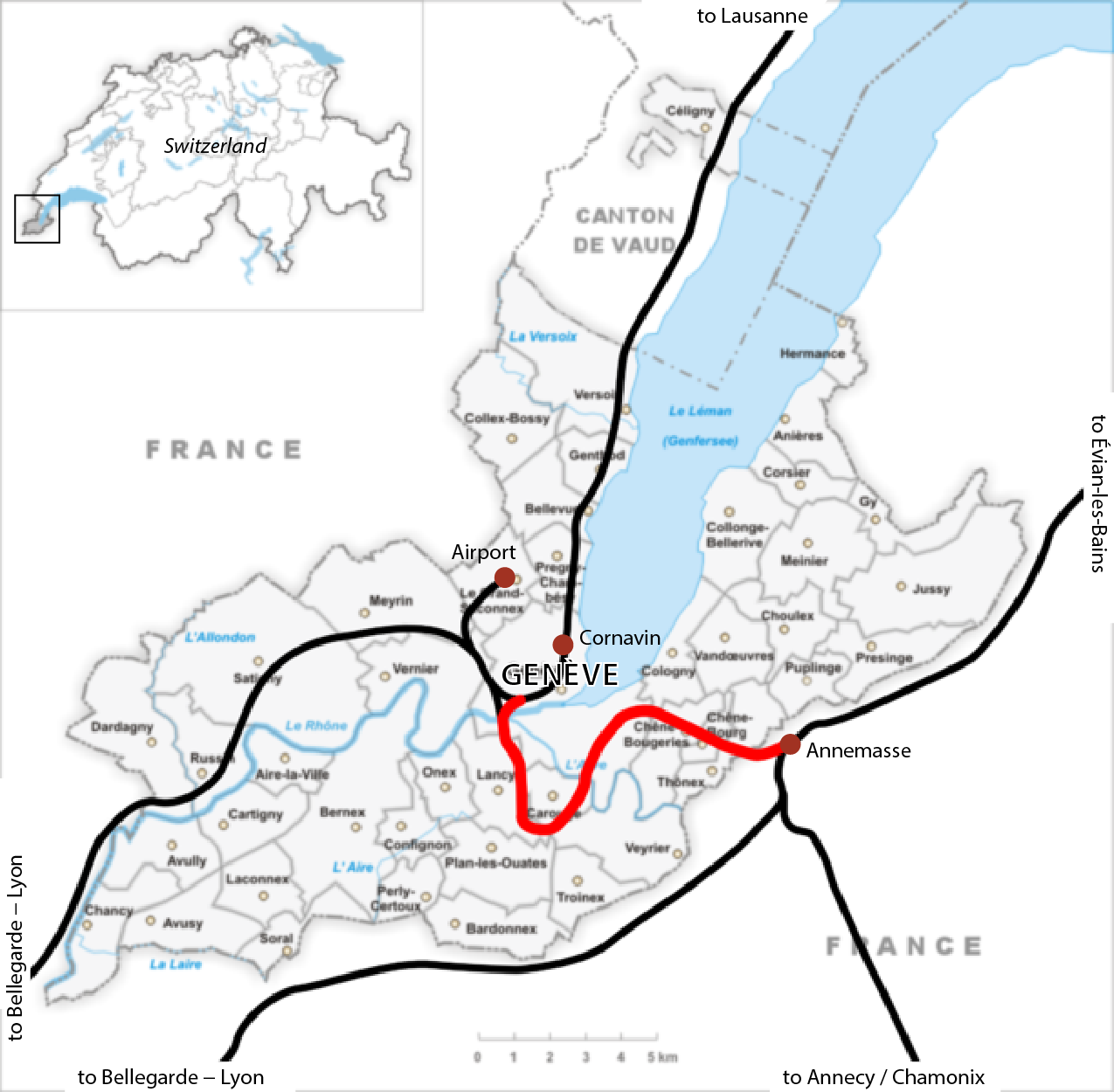 Tracé du CEVA à Genève, Suisse